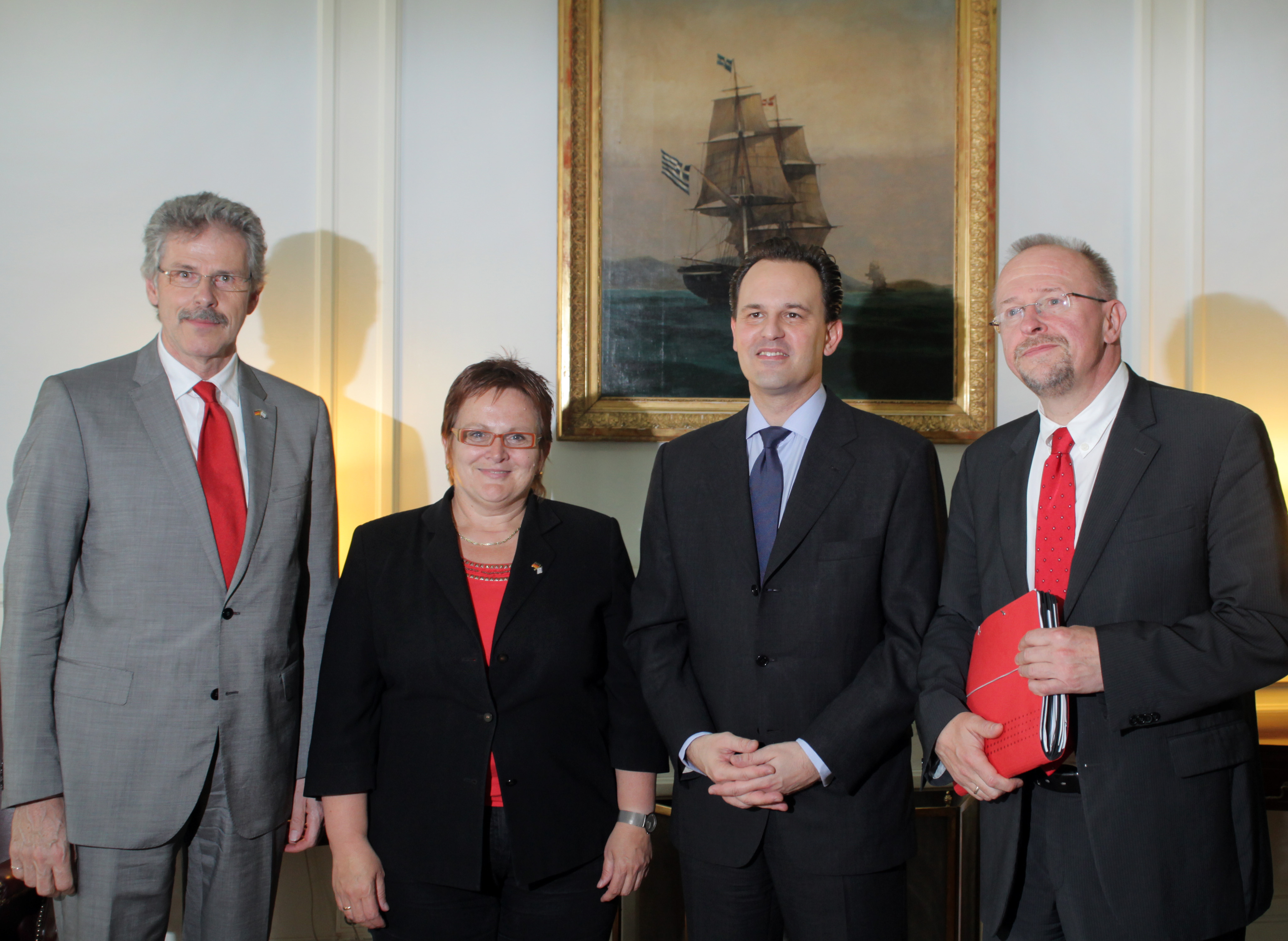 Την Πέμπτη 2 Ιουνίου 2011 ο Υπουργός Εξωτερικών Δημήτρης Δρούτσας συναντήθηκε με αντιπροσωπεία του Σοσιαλιστικού Δημοκρατικού Κόμματος της Γερμανίας, SPD, που απαρτιζόταν από τους Manfred Zoellmer, Elke Ferner και Axel Schaefer.